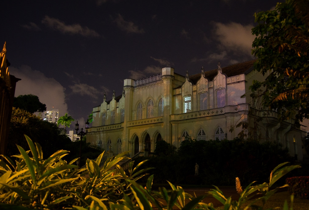 Mansão Henry Gibson, casa de 1847 em estilo neomanuelino - Recife, Pernambuco, Brasil